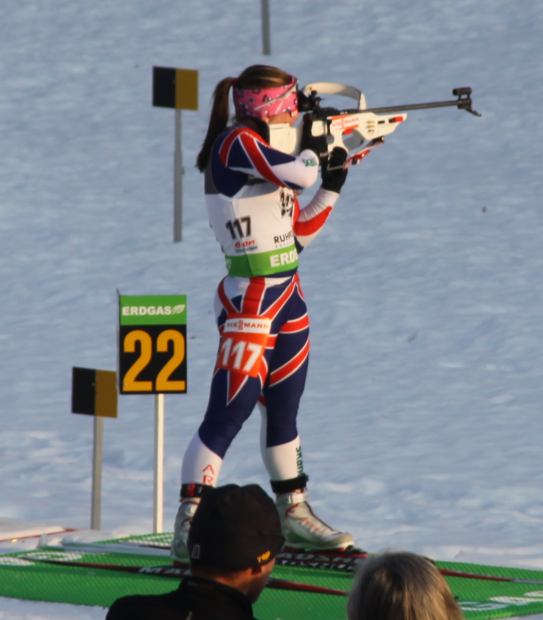 117 Nerys Jones GBR - Weltmeisterschaft 2012 - Ruhpolding